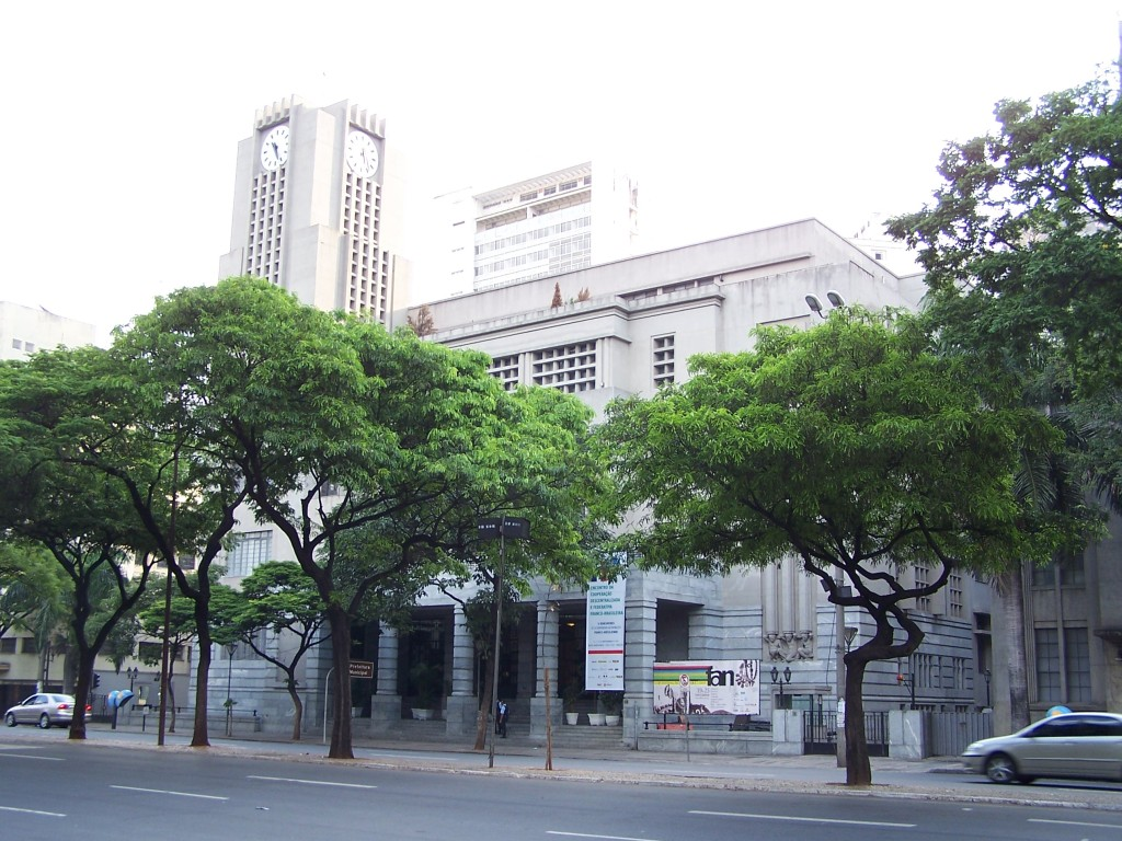 Prefeitura de Belo Horizonte - MG, Brasil.